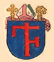 Герб на Григорий Цамблак от Хрониките на Констанцкия събор.